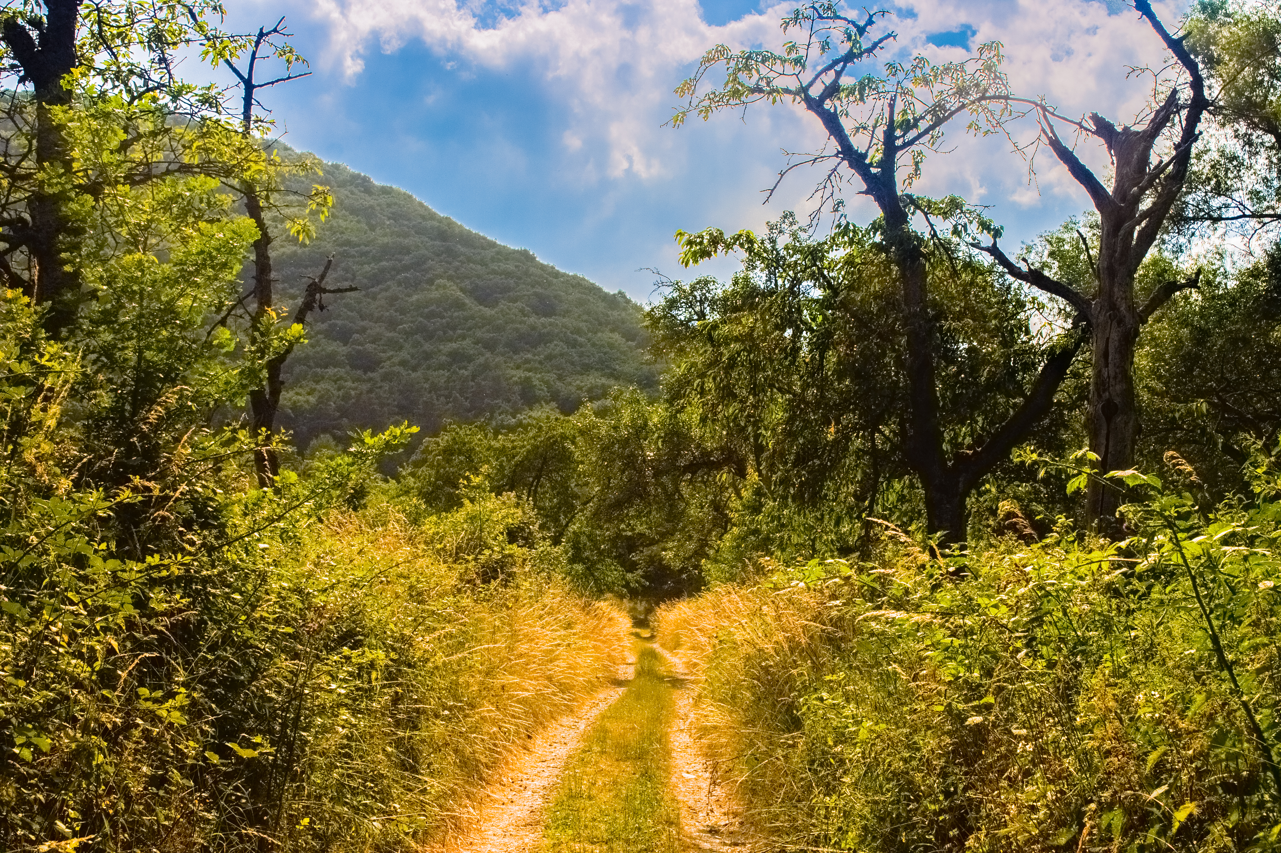 Dies ist ein Bild von einem Weg inmitten der Hinteren Dick im Eisenbolz von Boppard am Rhein; Naturschutzgebiet „Hintere Dick–Eisenbolz“.